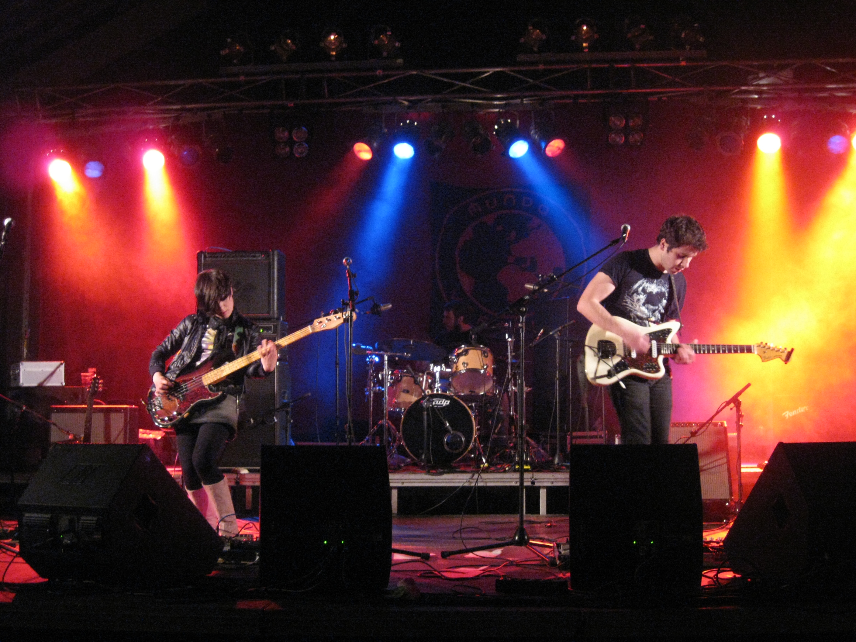 A banda de indie rock galega Triángulo de Amor Bizarro no Festival Mundo Vermello celebrado en Vilagarcía de Arousa o día 3 de abril do ano 2010.